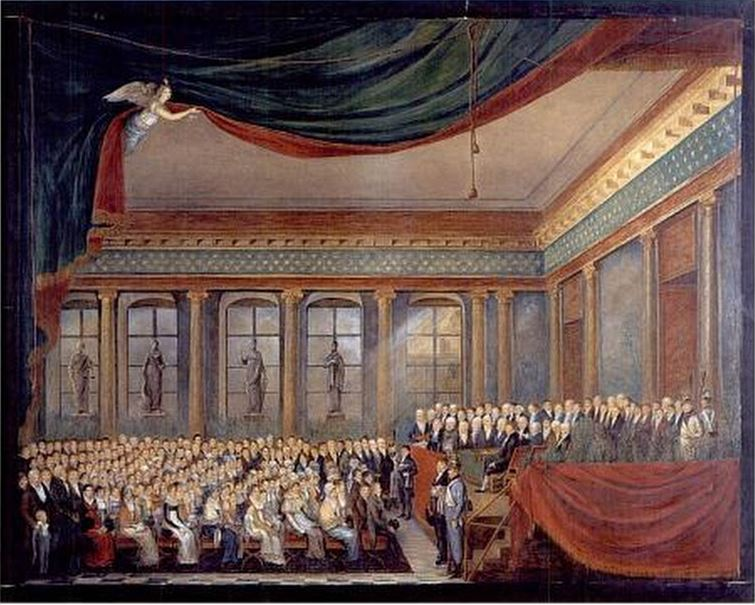 Gouache van Elisabeth de Latour uit 1811: plechtige prijsuitreiking in het grote salon van het gemeentehuis, naar aanleiding van de salon en de wedstrijd van 1811 (Musea van de stad Brussel)